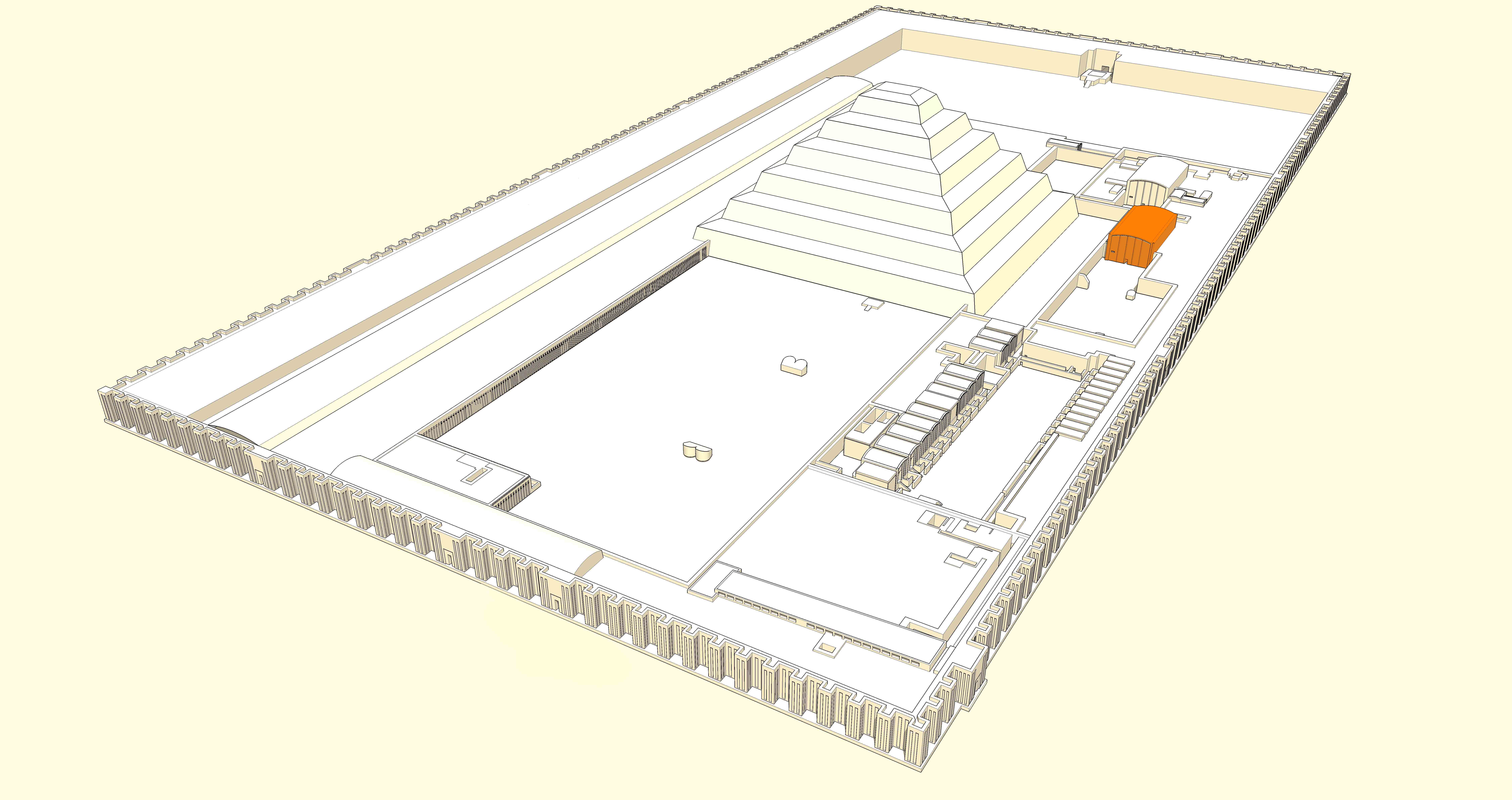 Position du pavillon sud dans le complexe funéraire de Djoser